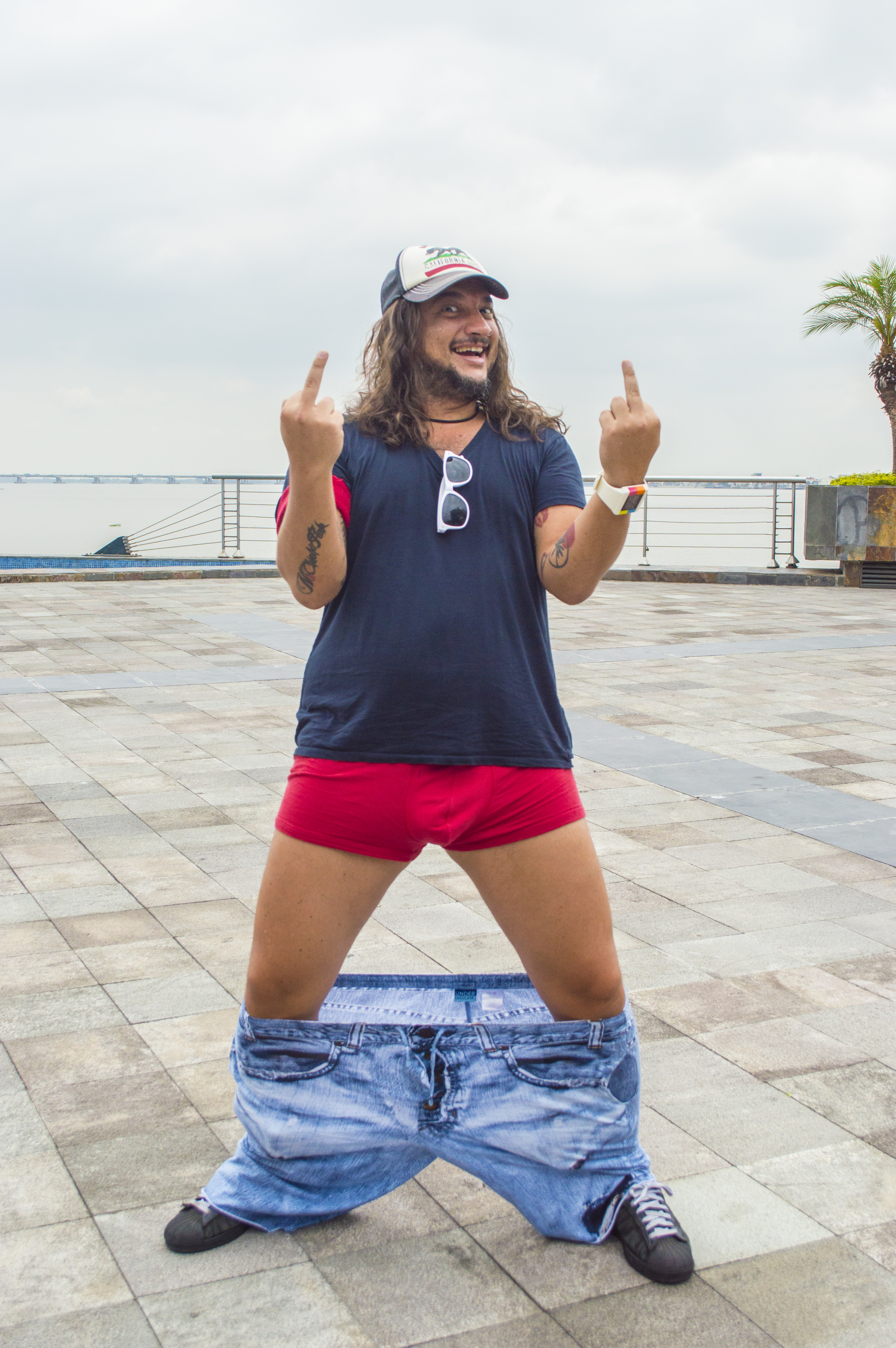 El humorista Adrián Nario "El Bananero" con su característico gesto obsceno, en 2016 a su visita por Guayaquil, Ecuador.